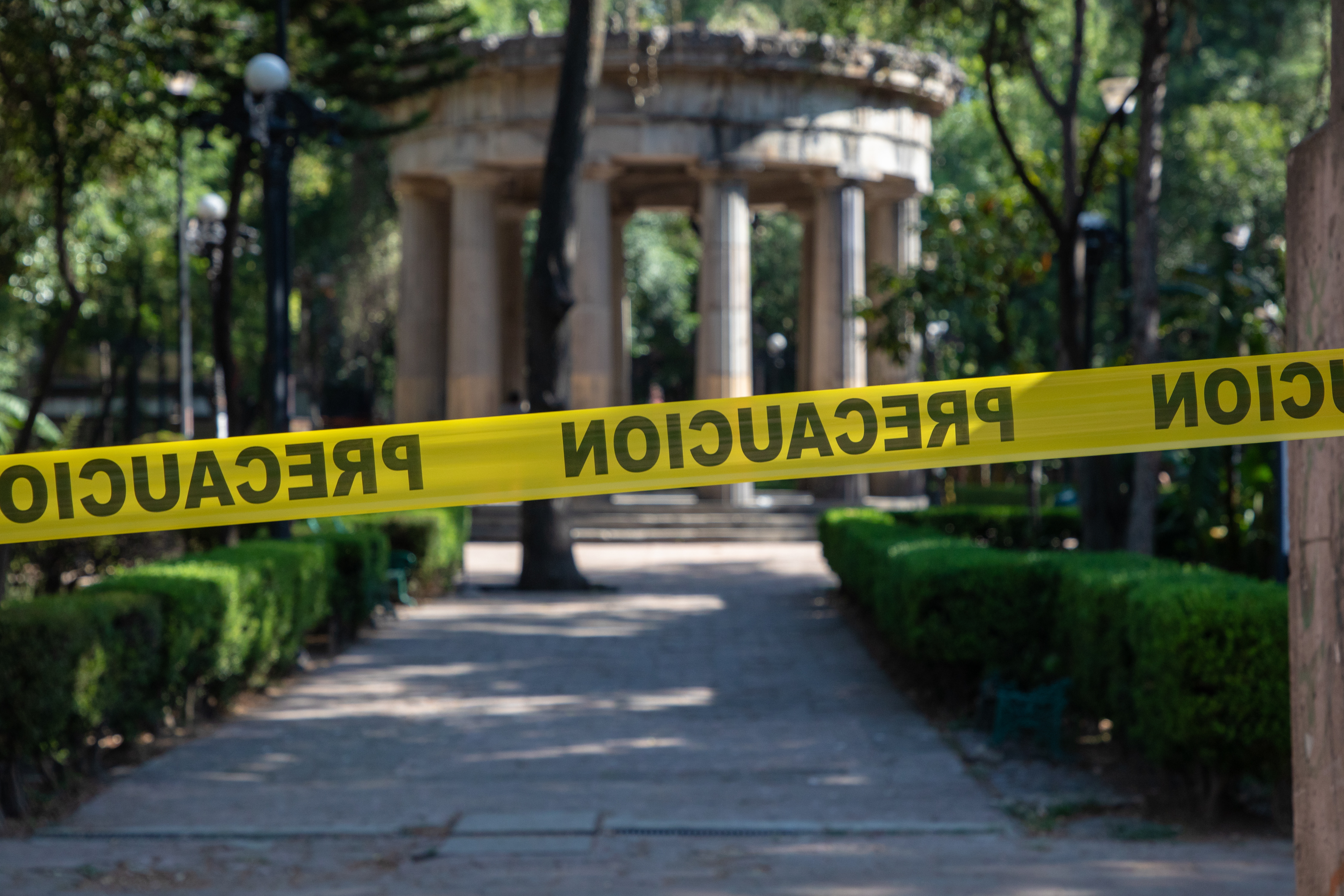 Cierre de los espacios públicos en Tlatelolco, Ciudad de México.